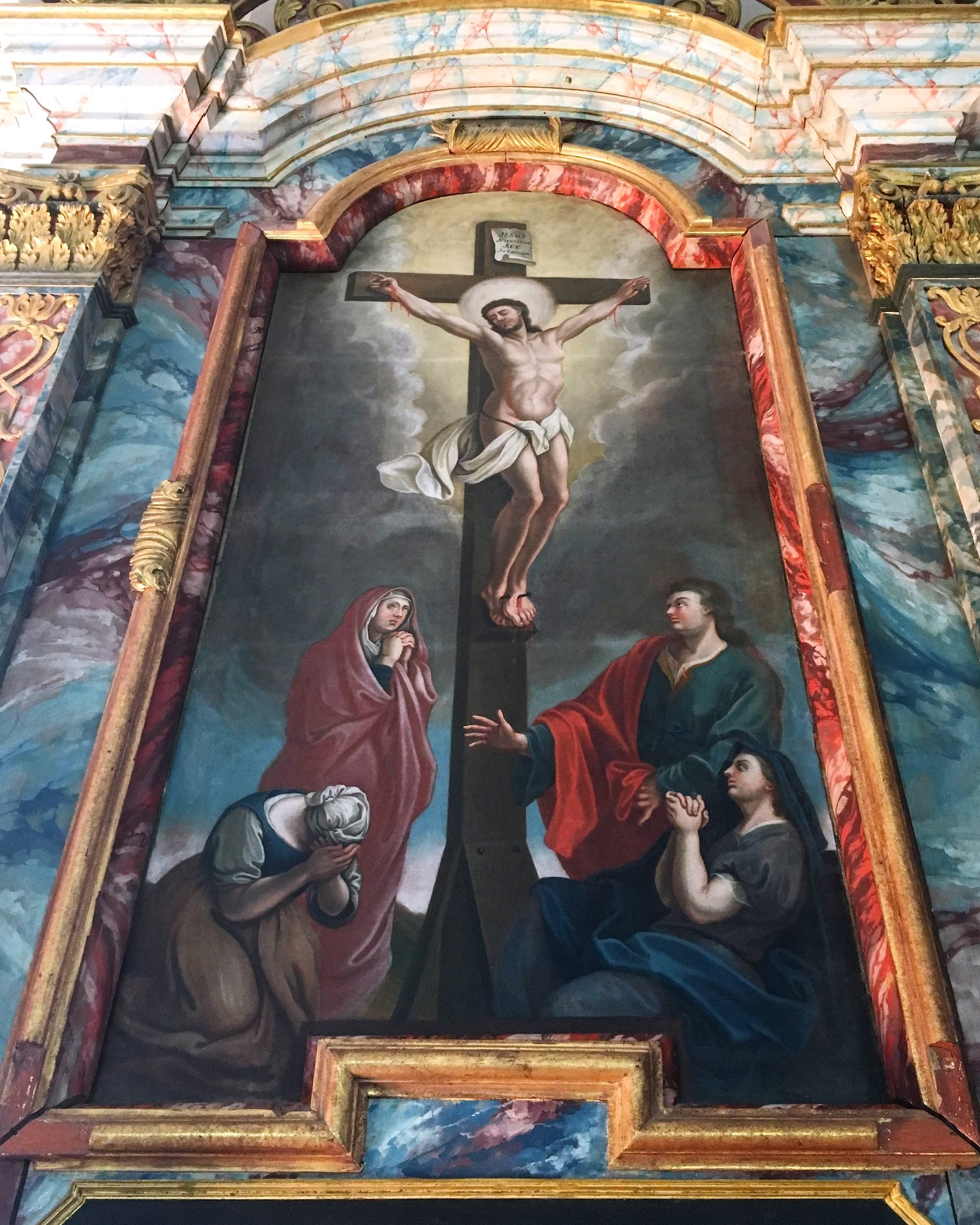 Altaret från Bergs gamla kyrka i Jämtland, utfört 1767–47 av konstären Carl Hofverberg och bildhuggaren Jonas Granberg. Finns idag uppställt längs sidoväggen i Bergs kyrka.